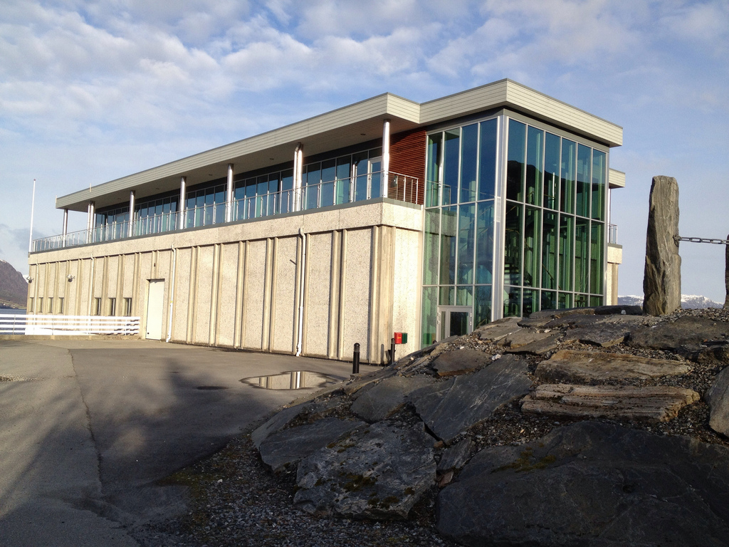 Longline fishing company